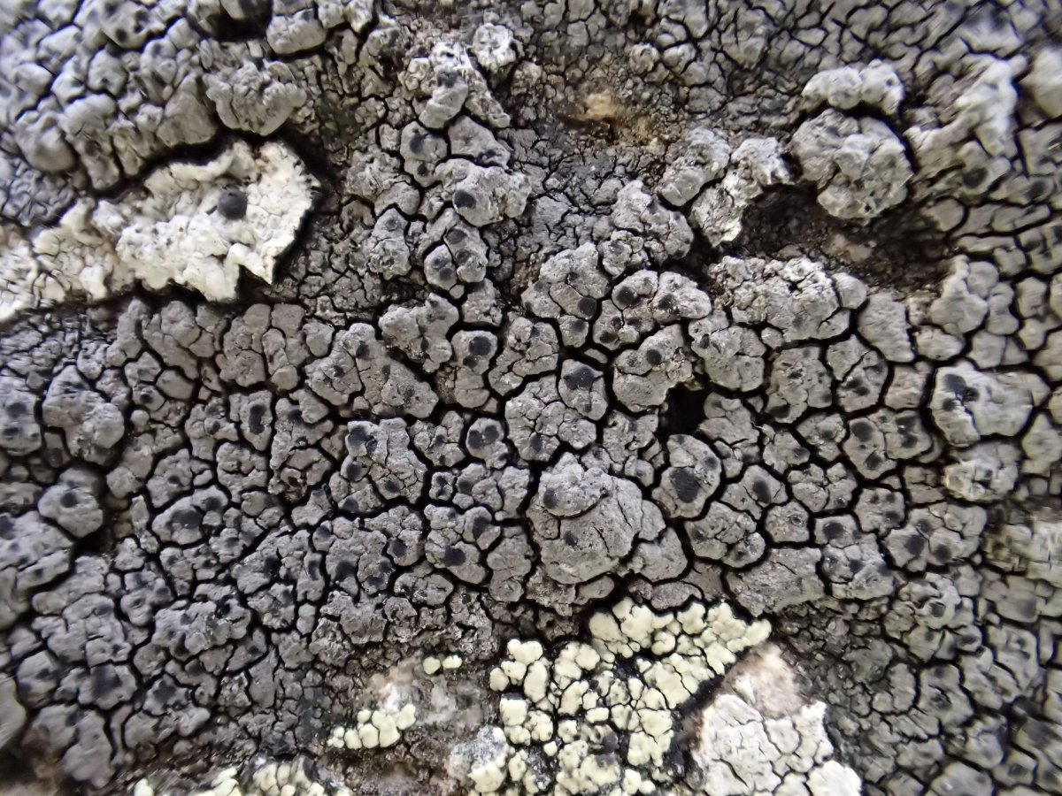 Schaereria fuscocinerea Digulleville (Manche, Normandie, France)